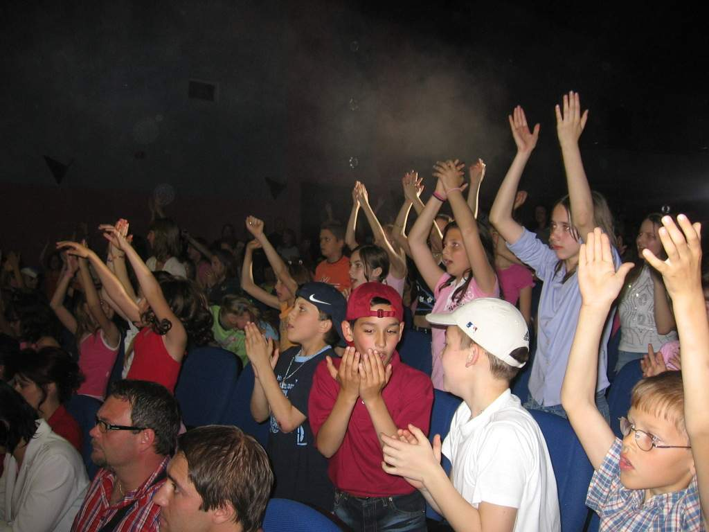 Djeca pjevaju hitove, Beli Manastir, 18. V. 2006.